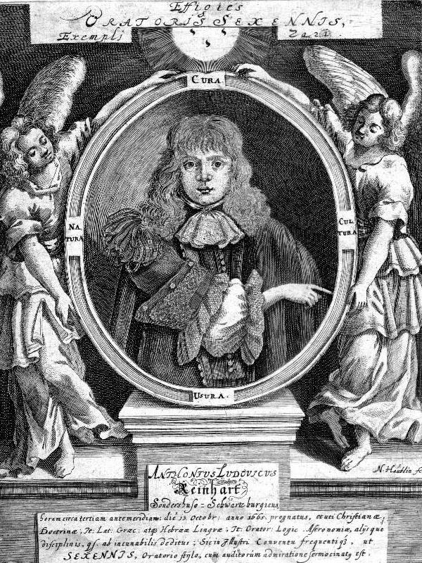 Anton Ludwig Reinhart (1665/1707), Pastor zu Seega bei Frankenhausen und Vater von Pastor August Wilhelm Reinhart zu Heringen. Die Abbildung zeigt ihn als sechsjähriges Wunderkind.